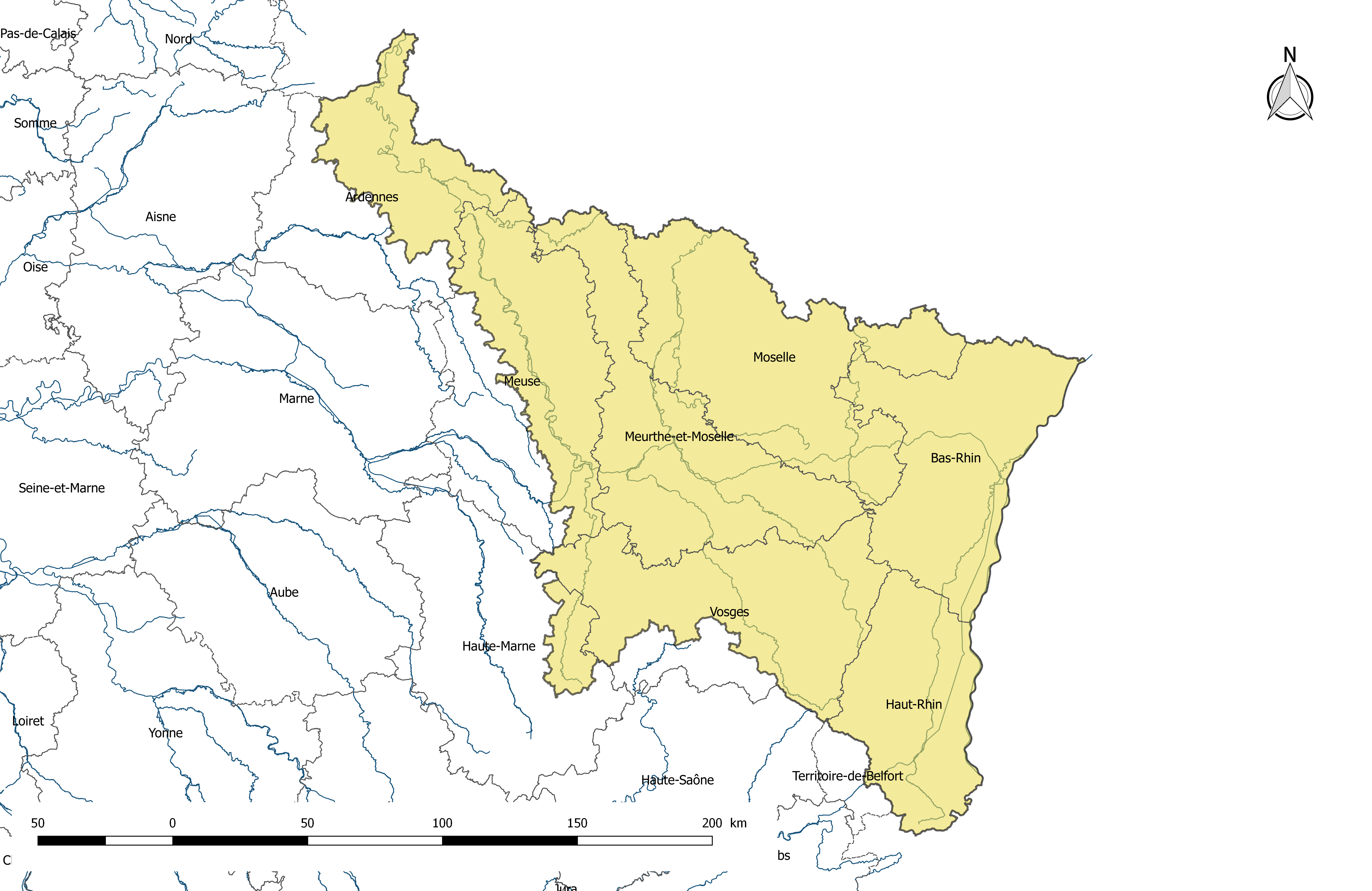 Carte de la circonscription de bassin Rhin-Meuse en France, avec les départements qui la composent.